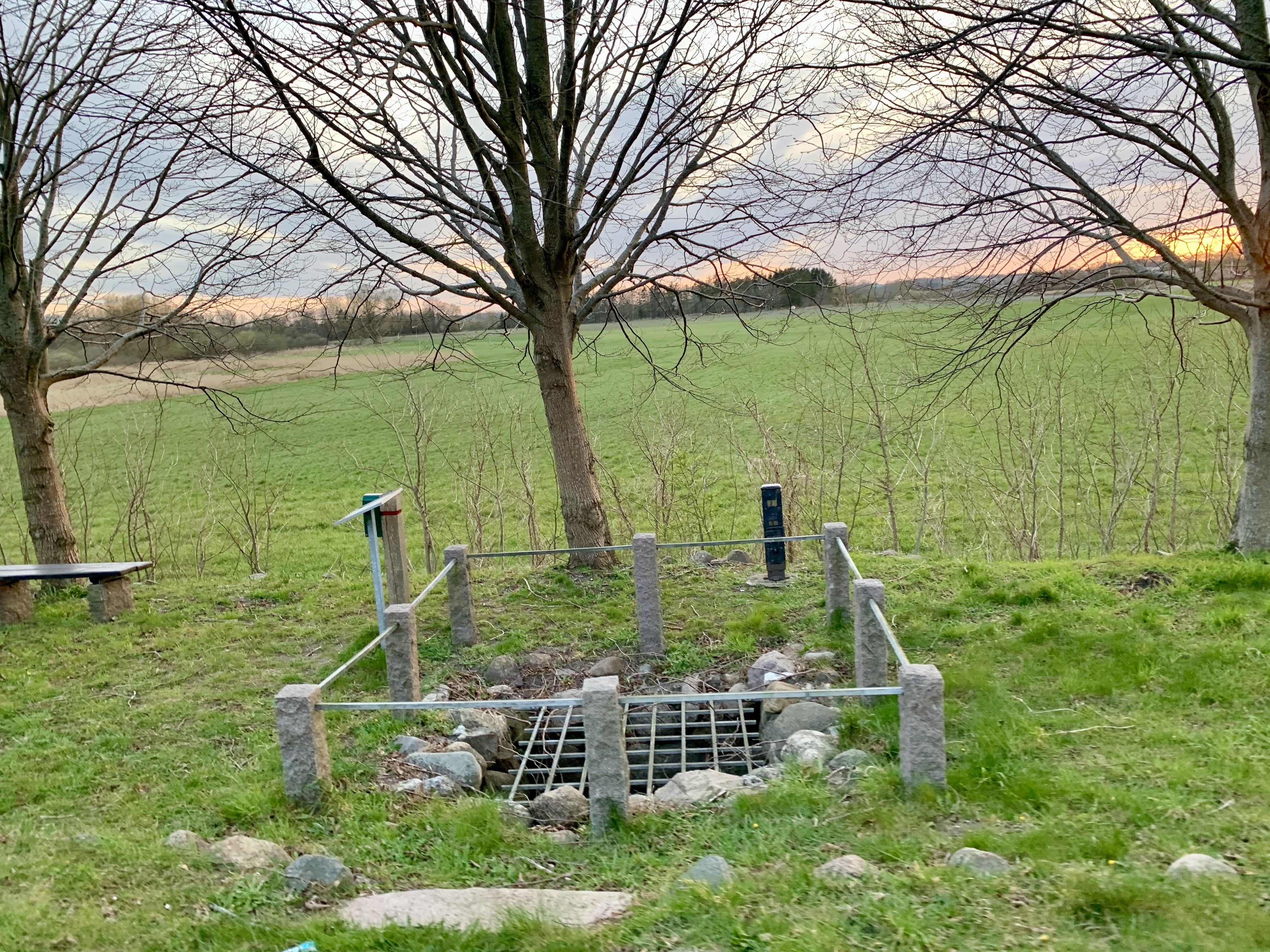 Sct.Olavs Kilde og pengeblok